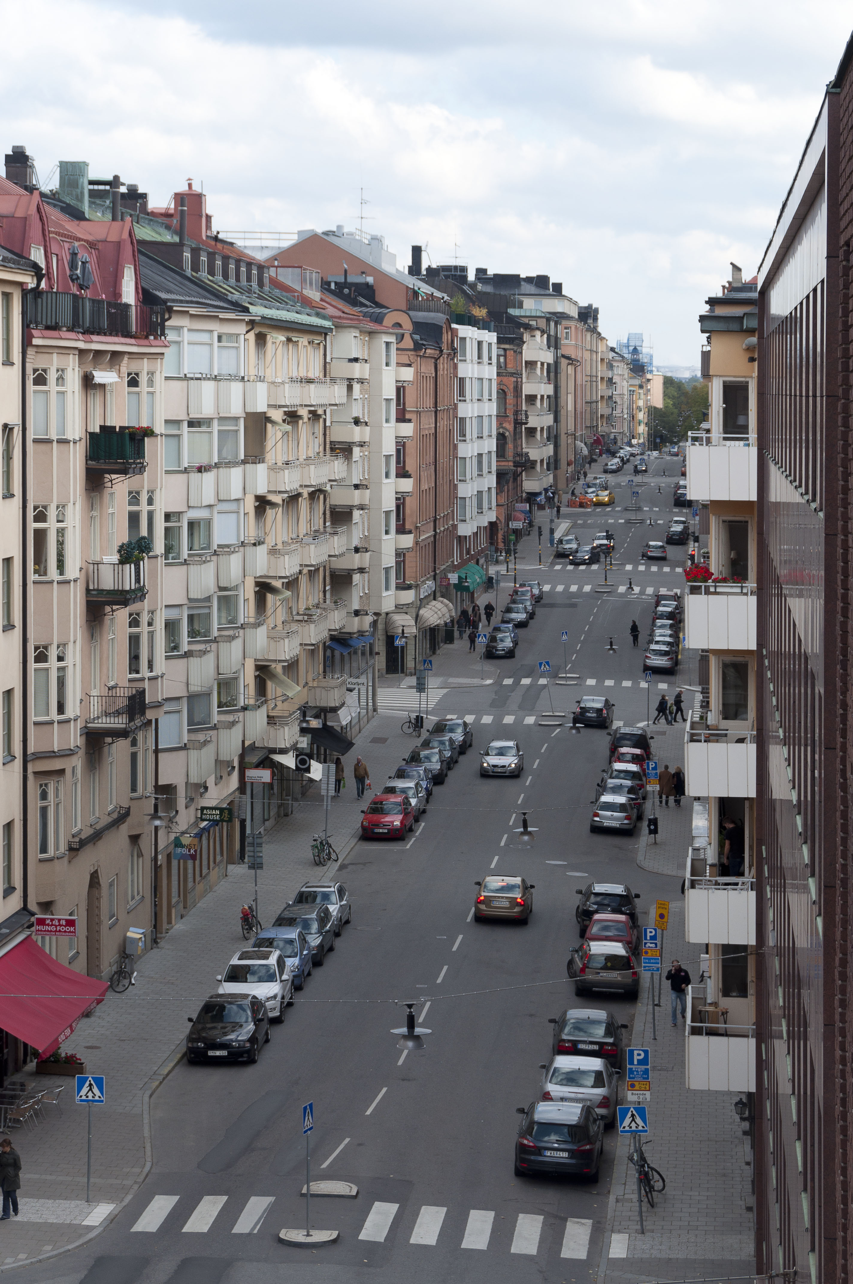 Linnegatan österut